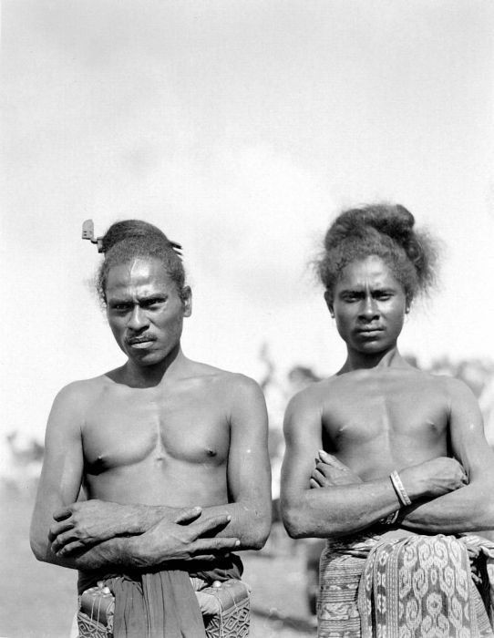 Negatief. Twee Atoni-mannen uit Amarasi